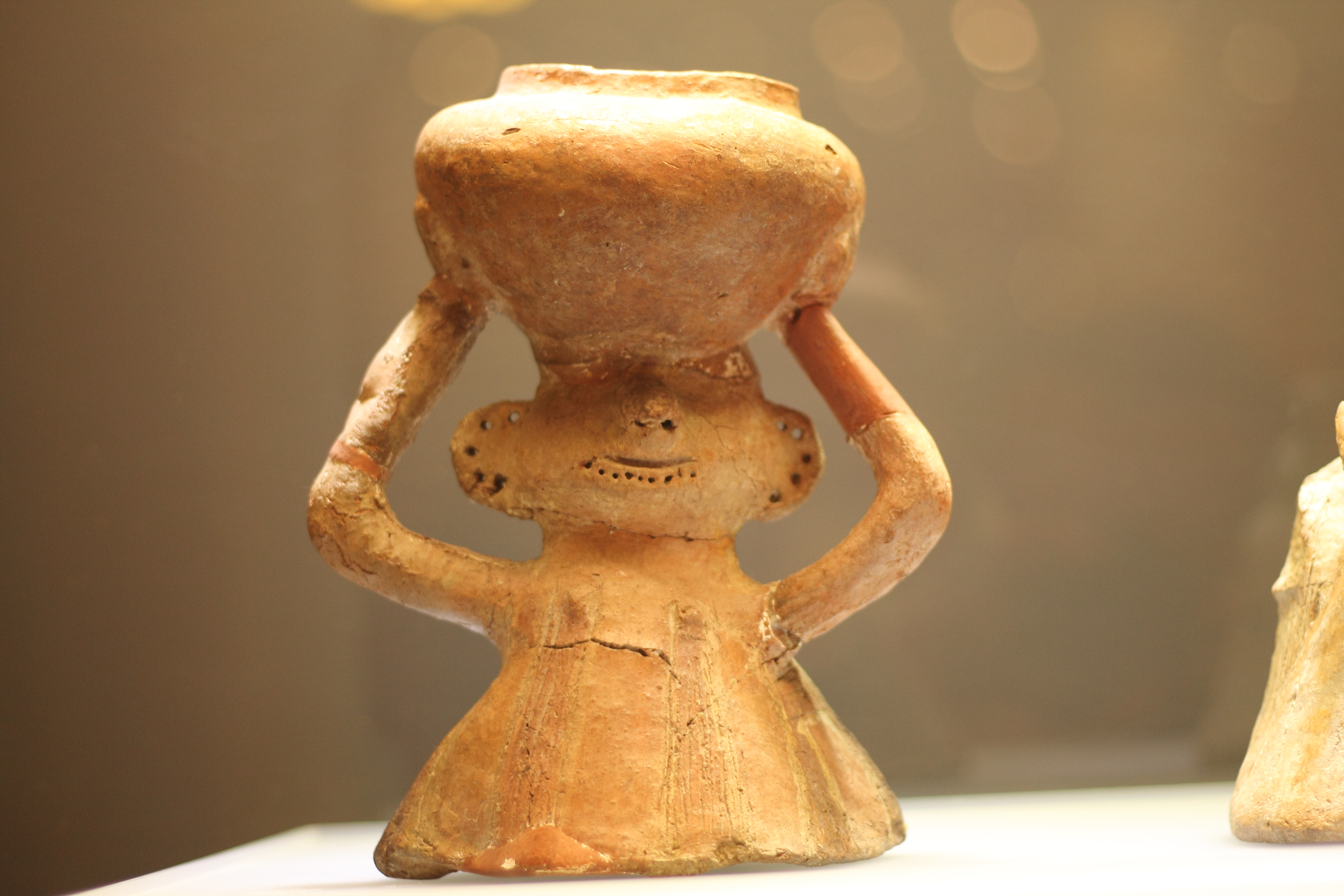 Aurul și argintul antic al României expozitie temporara Neolithic Art